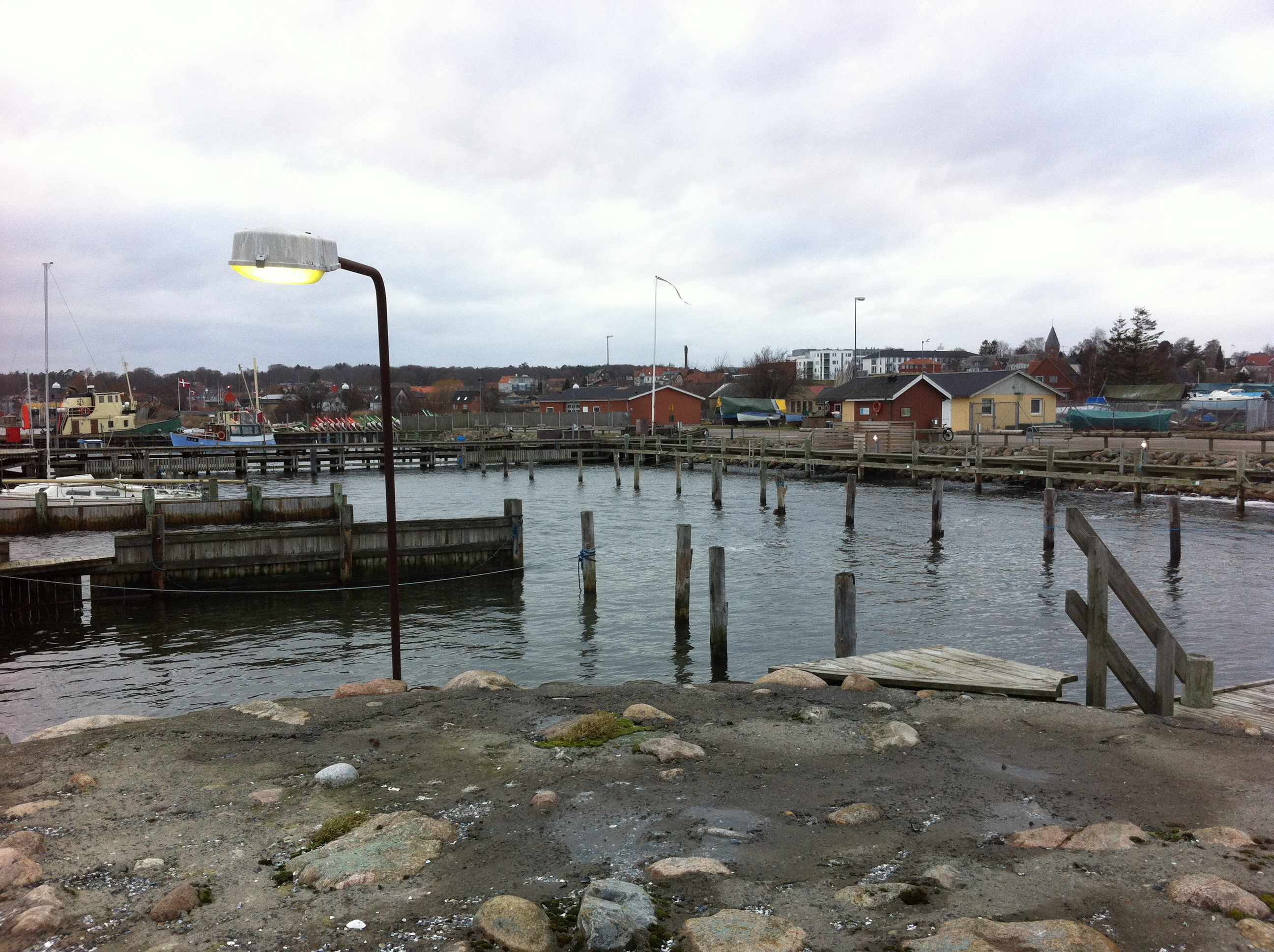 Hadsund Fiskehavn, 9560 Hadsund